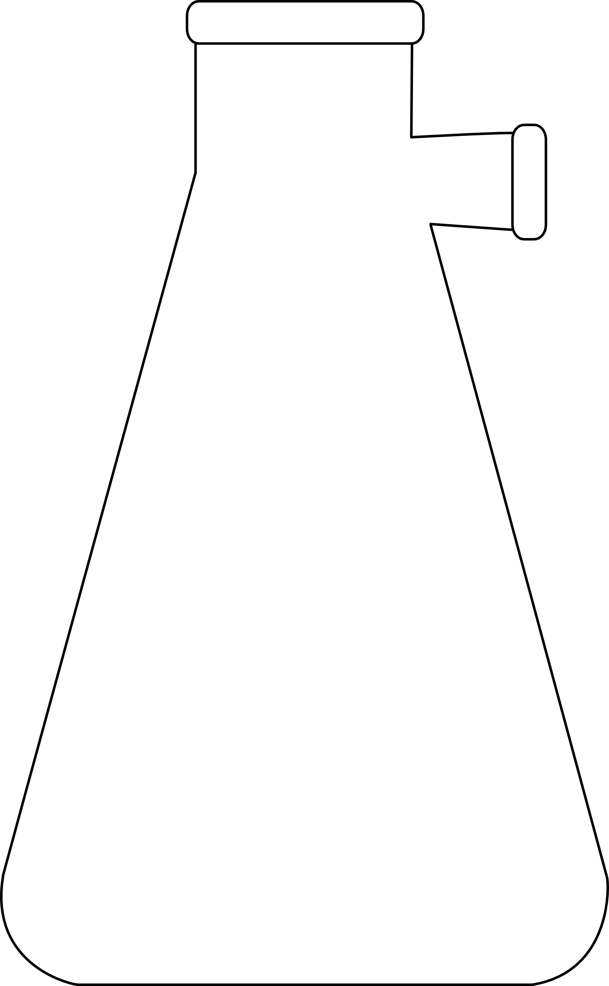 selbst gezeichnet mit Inkscape von Talos 6. Jul 2005 18:57 (CEST)